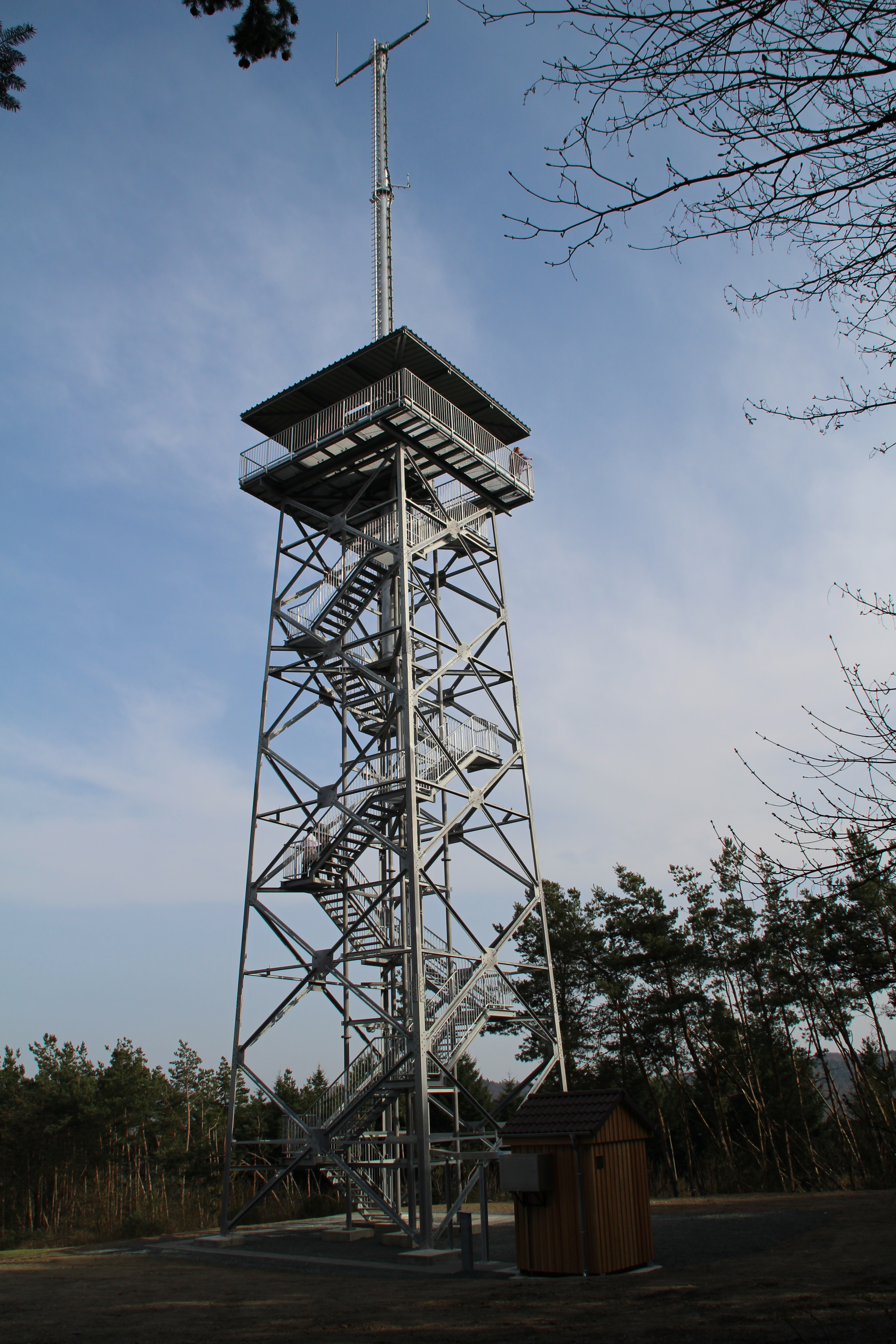 Aussichtsturm